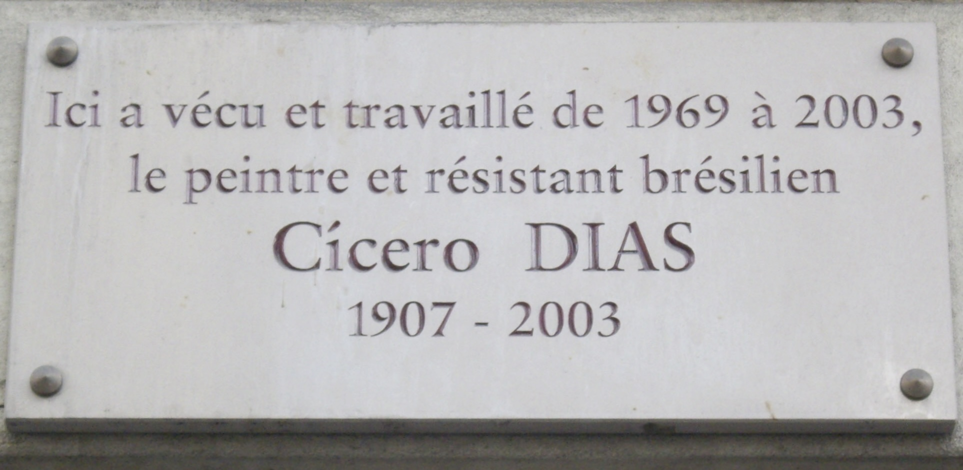 Plaque commémorative, 123 rue de Lonchamp, Paris 16e. « Ici a vécu et travaillé de 1965 à 2003 le peintre et résistant brésilien Cícero Dias, 1907-2003. »